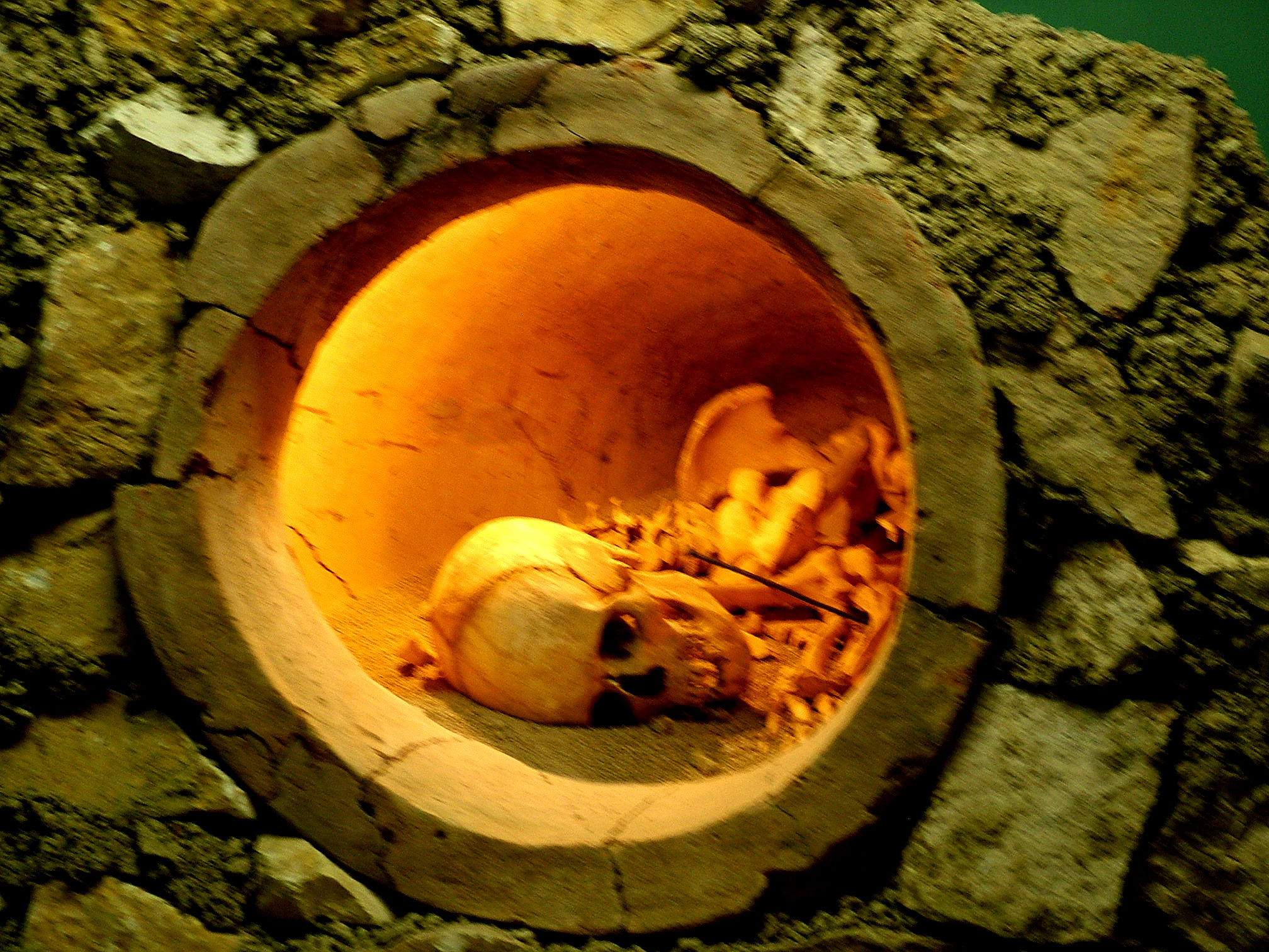 Urnasíros temetési mód (Anatóliai Civilizációk Múzeuma, Ankara, Törökország)